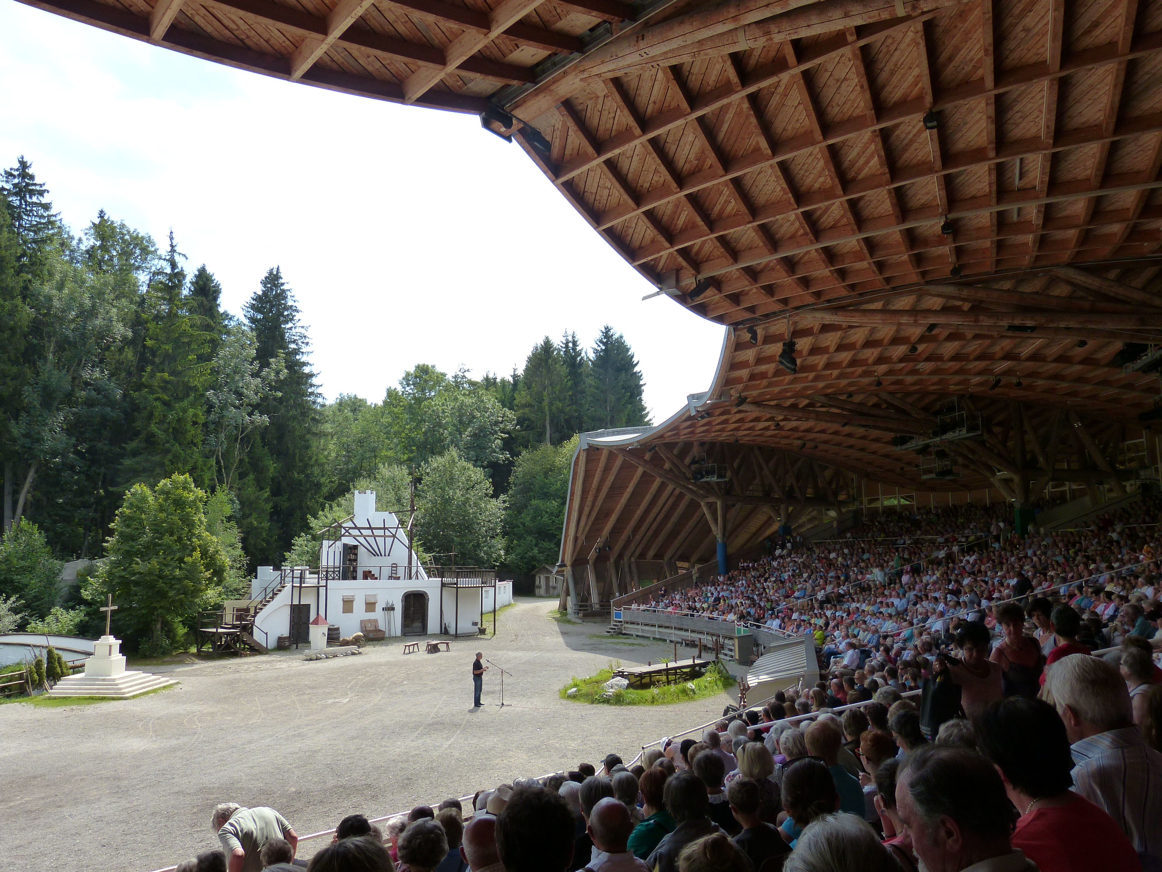 Freilichtbühne Altusried, 2013 (Don Quijote)